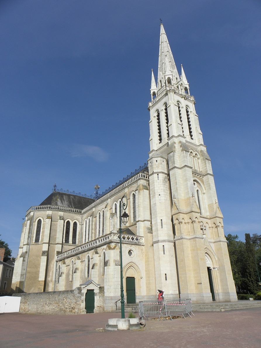 Vue extérieure de la basilique de La Chapelle du chêne à Vion (72).